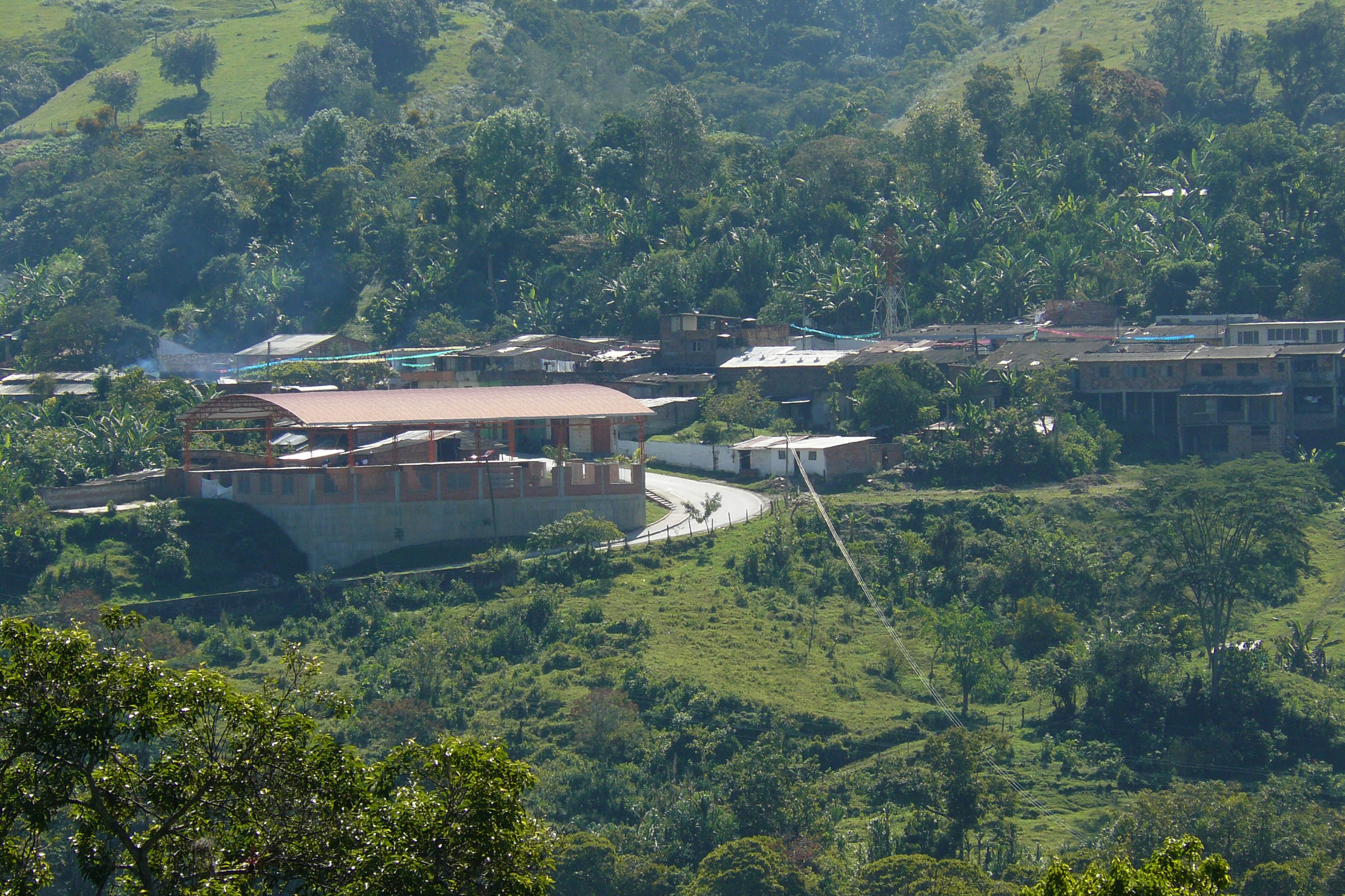 Vadoreal (Santander)